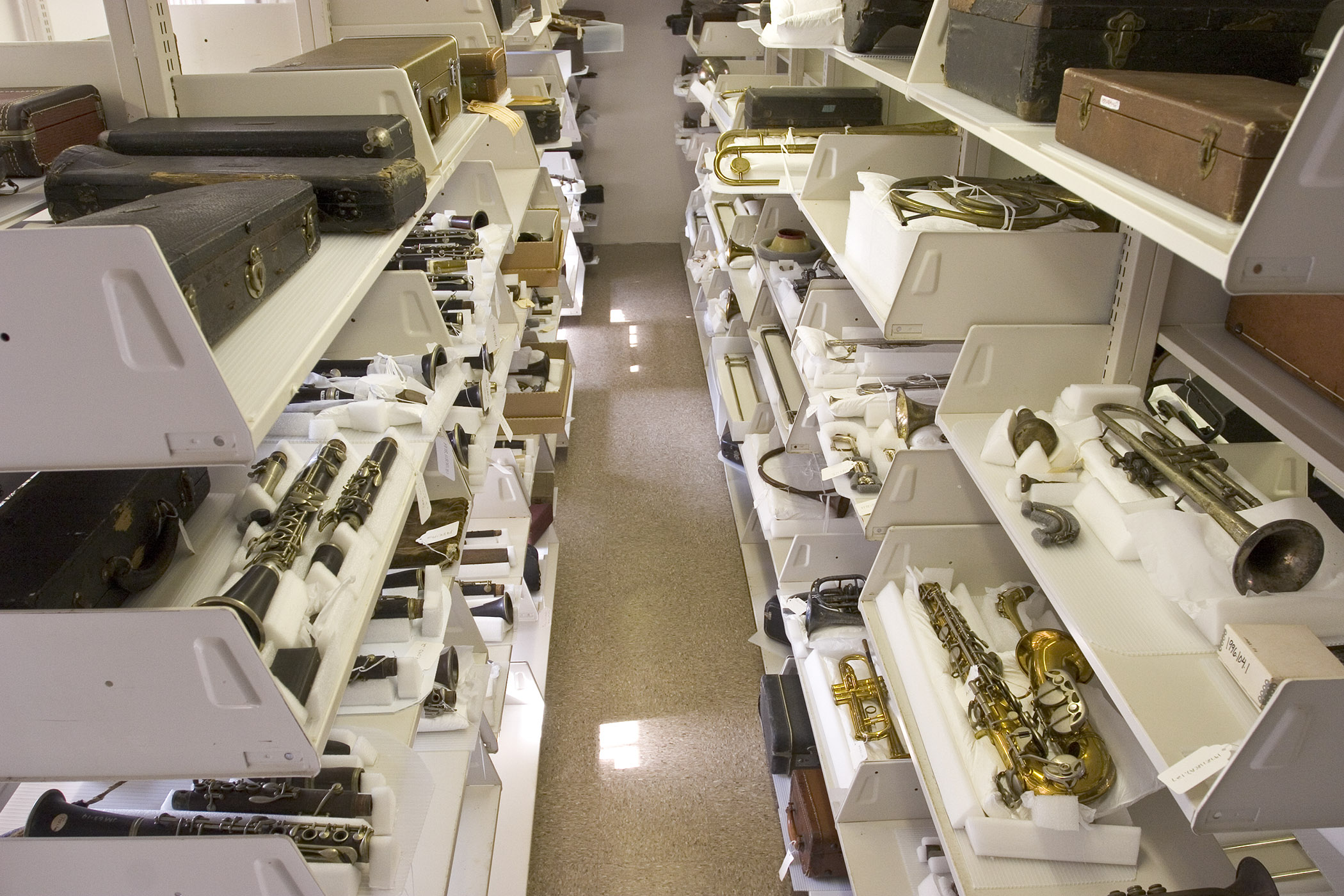 MarkJSindlerLSMPhoto_20080301_MG_5987